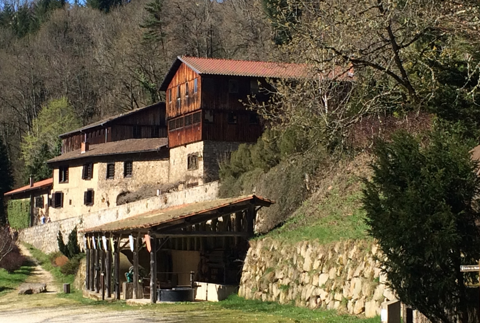 Papiermühle aus dem 15. Jh.